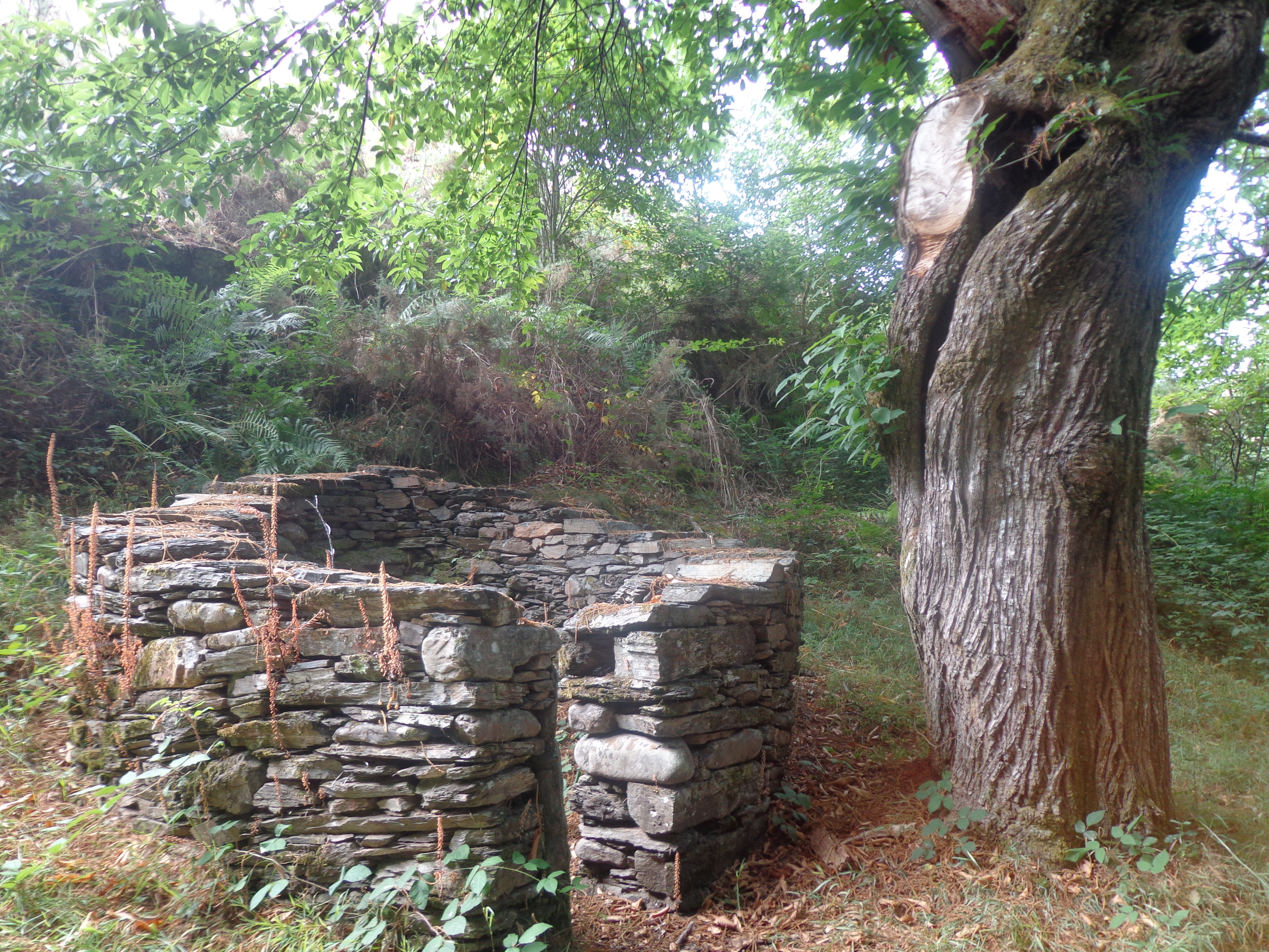 Ouriceira na Cortevella - Martín